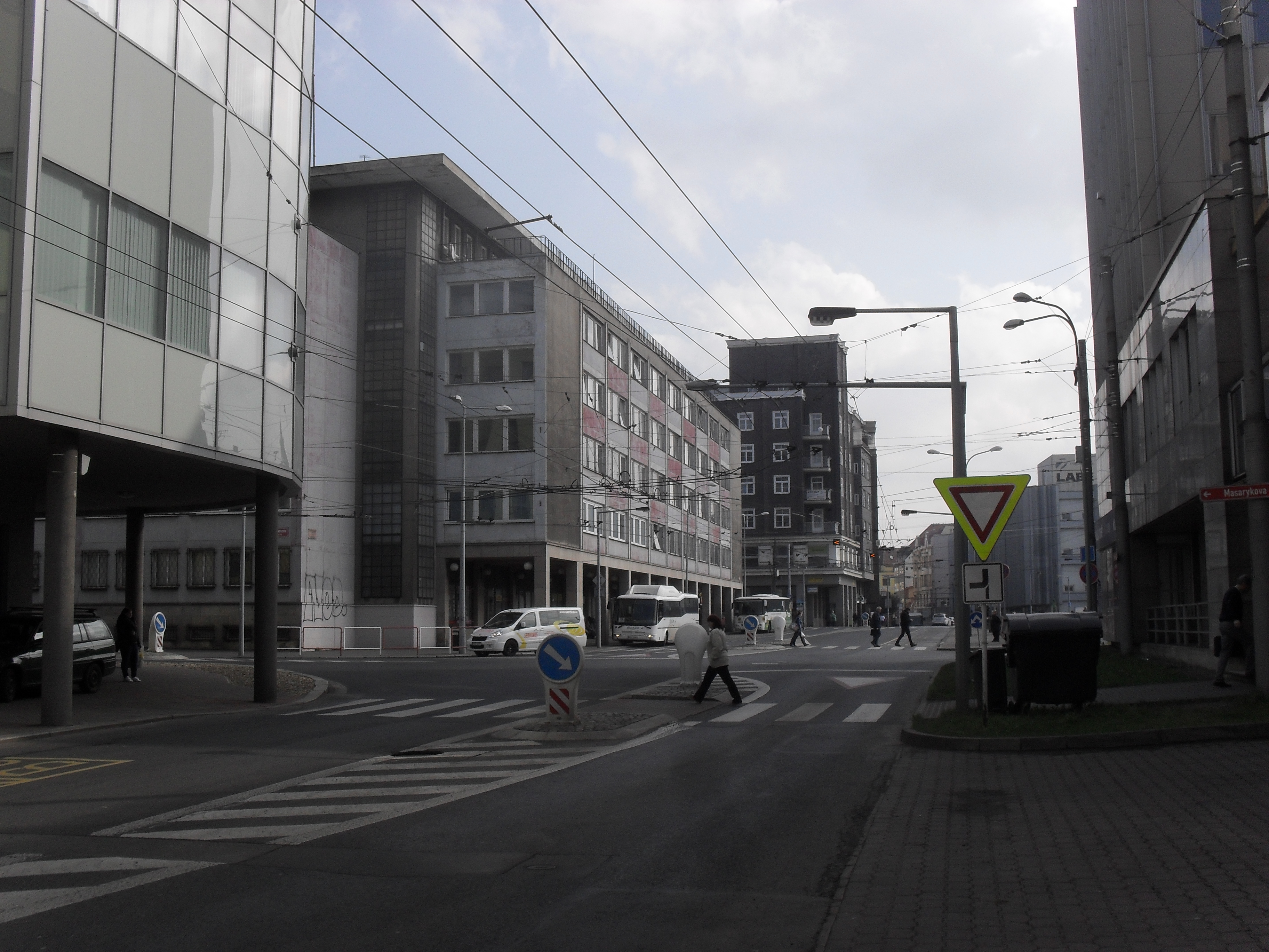 současný stav tohoto místa, focený přibližně ze stejného místa. Bohužel, blíže to nešlo, kvůli hustotě dopravy (musel bych stát uprostřed silnice).